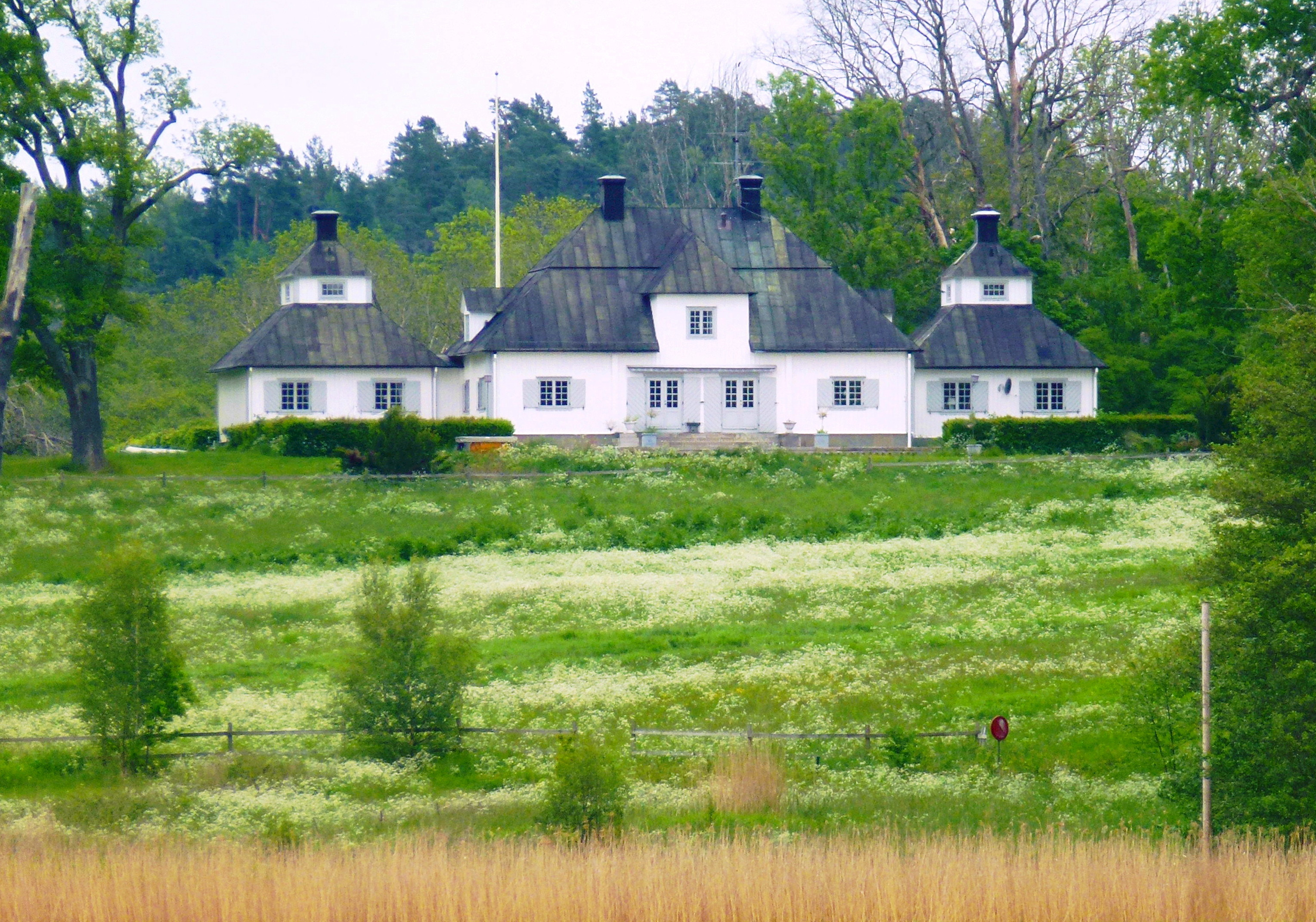 Fituna herrgård, vy över Mörkarfjärden